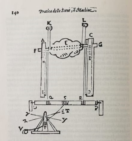 Hier sieht man eine Skizze einer Wolkenmaschine von Nicola Sabbatini.